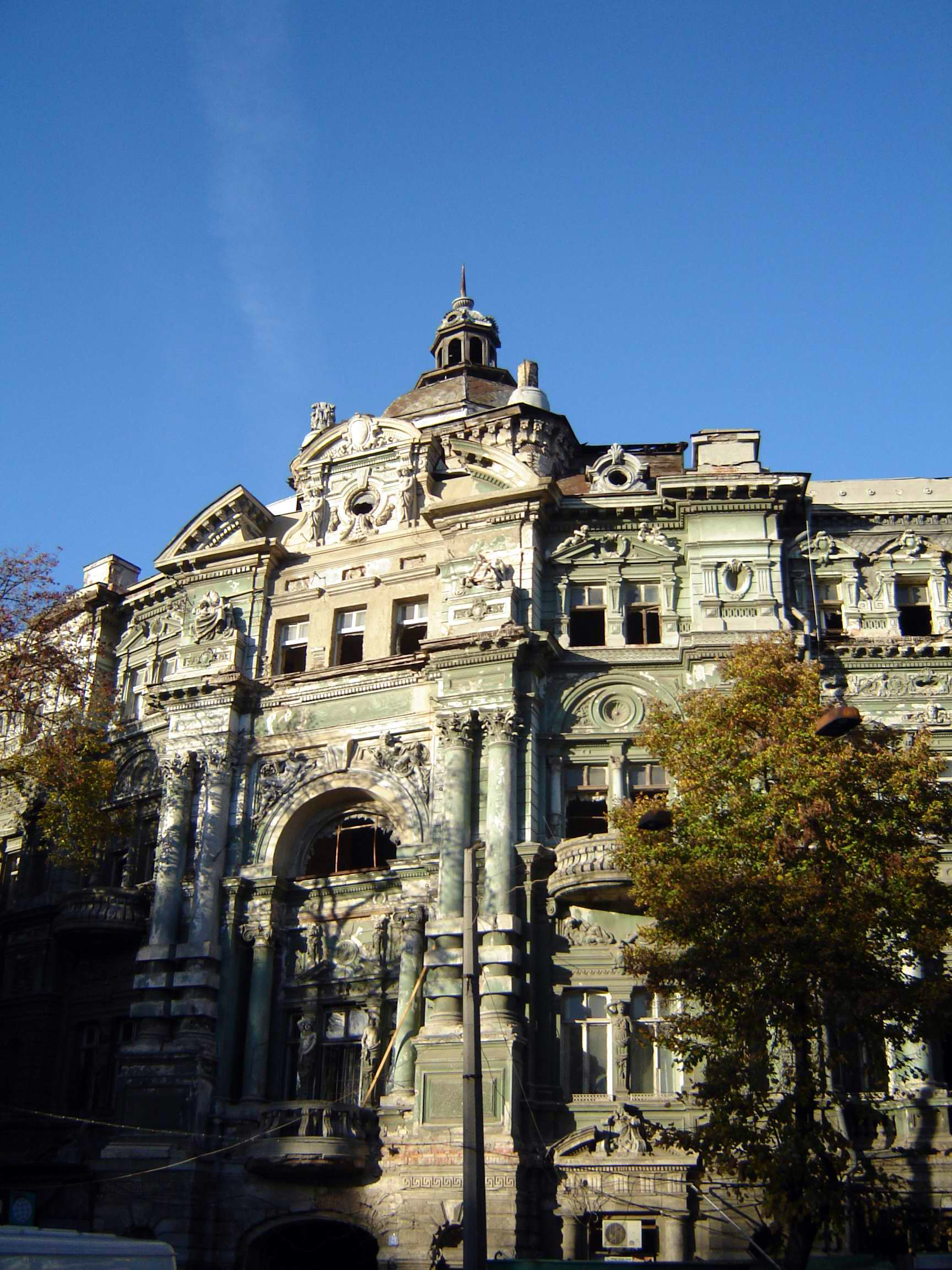 Будинок (Руссова), Одеса, Садова вул., 21